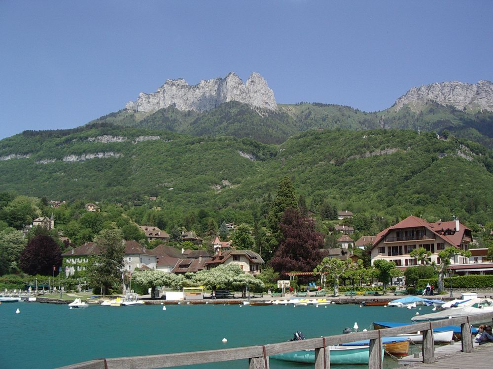 talloires, Haute-Savoie (France)